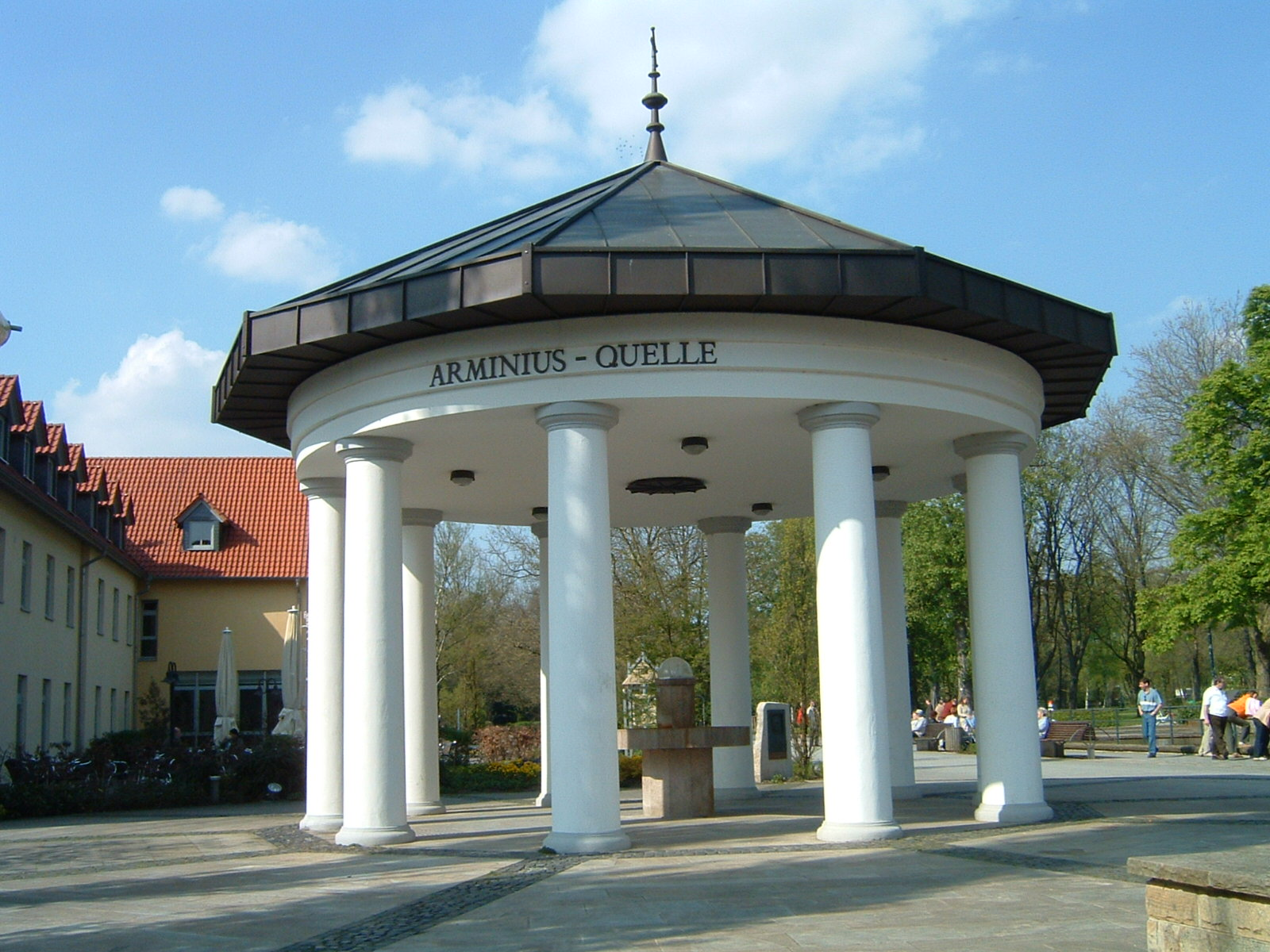 Arminiusquelle gegenüber der Lippequelle und des Arminiusparks, Bad Lippspringe